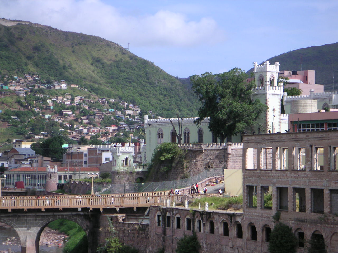 Tegucigalpa. Photo: Soman